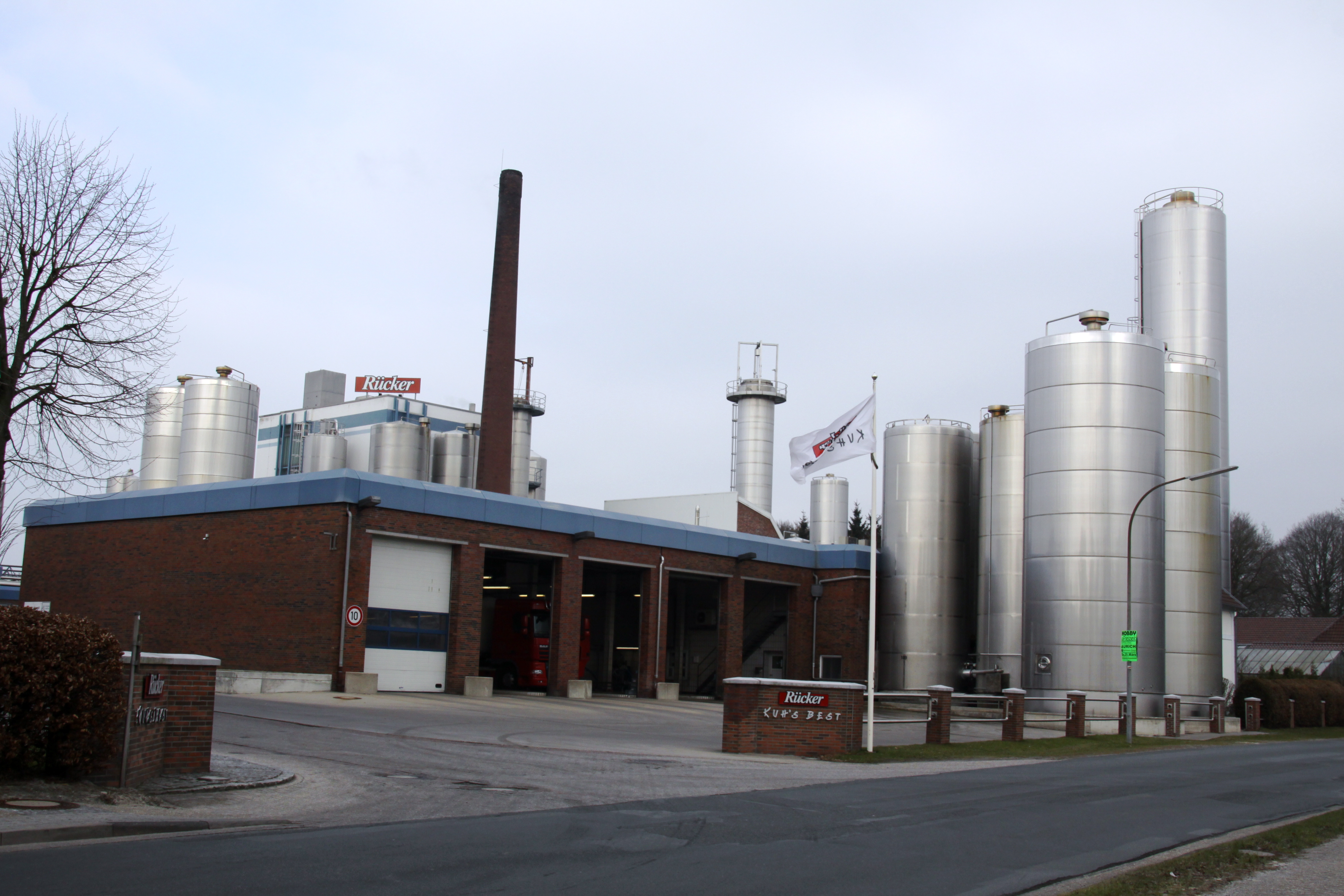 Molkerei Rücker, Firmensitz in Aurich-Egels